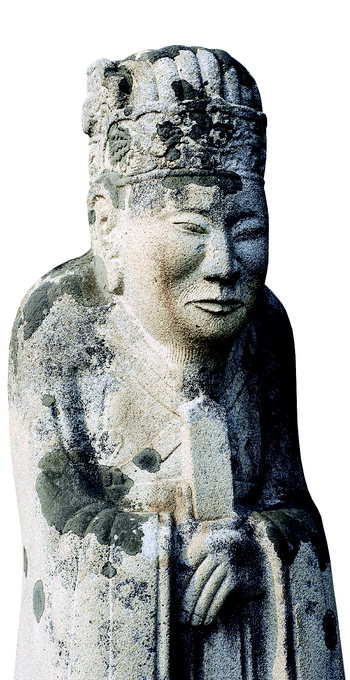 조선의 추존왕 익종 왕릉의 문인석